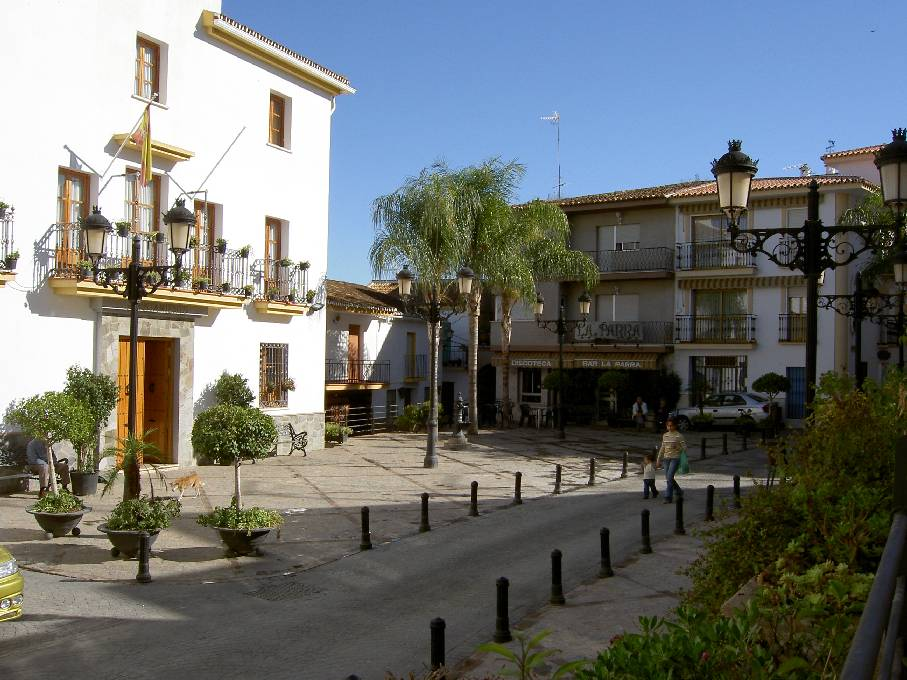 Het dorpsplein van Guaro, prov. Málaga, Spanje (village square of Guaro)